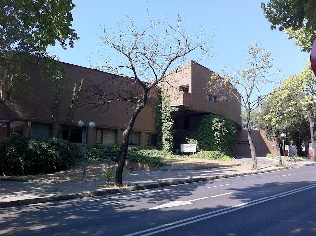 COLEGIO MAYOR NUESTRA SEÑORA DE LUJAN, vista desde la calle